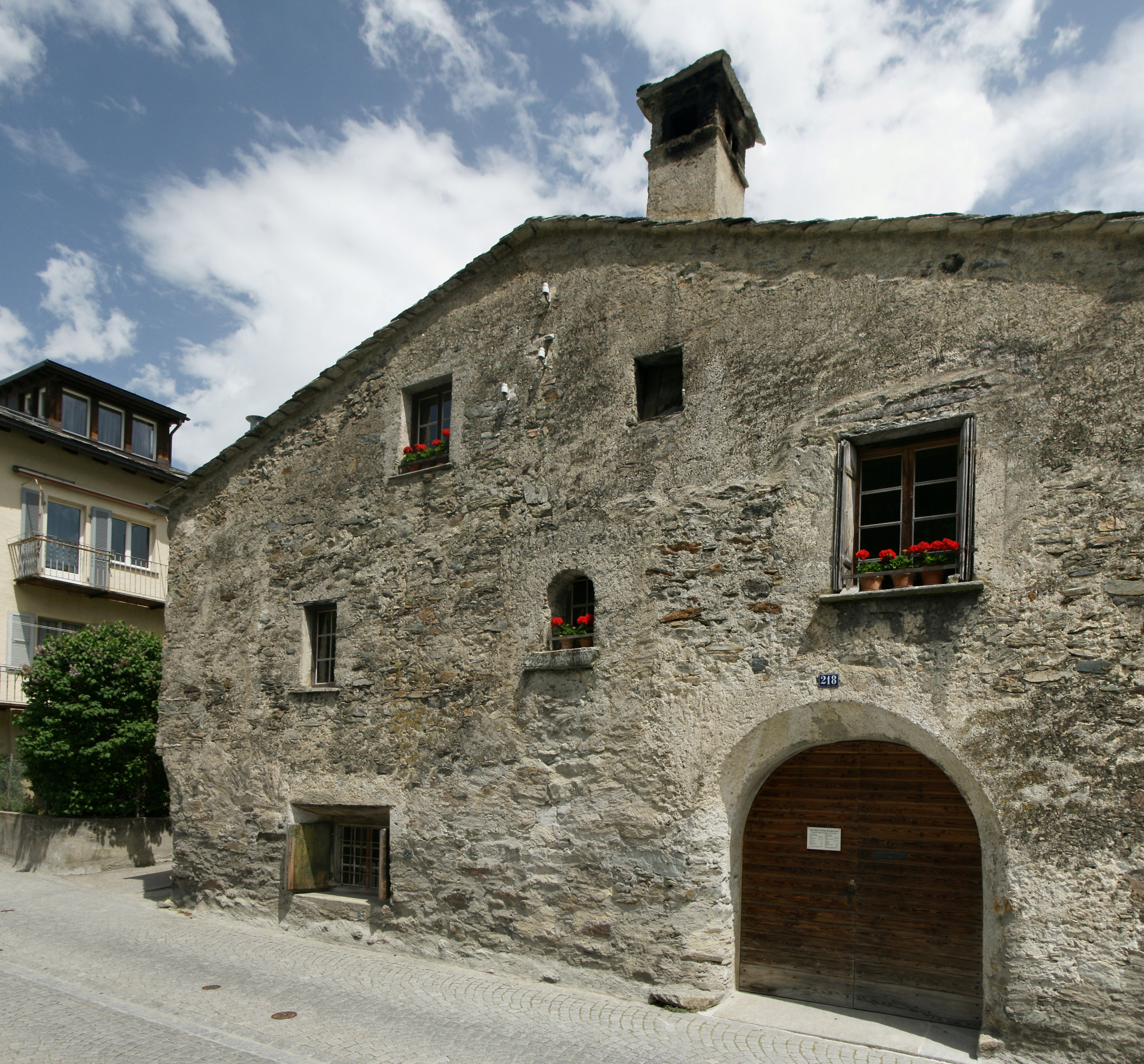 Museo valligiano poschiavino, Casa Tomé. Poschiavo (deutsch/rätoromanisch Puschlav) ist eine politische Gemeinde im südlichen Graubünden (Schweiz). Zusammen mit der Nachbargemeinde Brusio bildet Poschiavo die Talschaft Valposchiavo (deutsch: Puschlav) und den Bezirk Bernina.